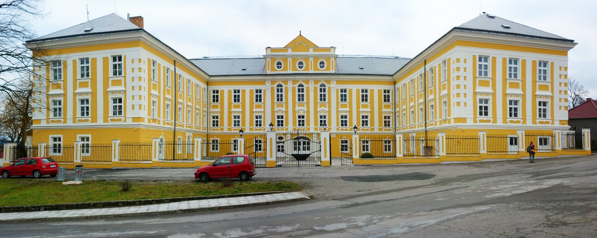 Zámek ve Starém Hobzí po opravě v roce 2015